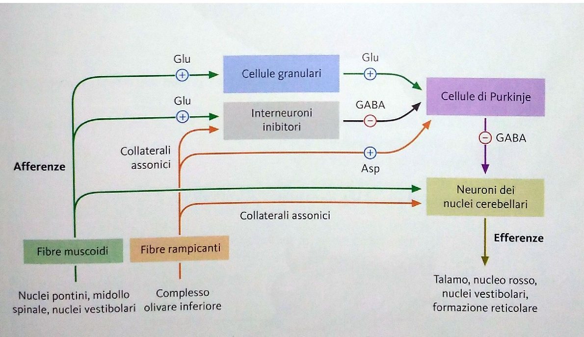 L'immagine mostra schematicamente le connessioni del cervelletto.